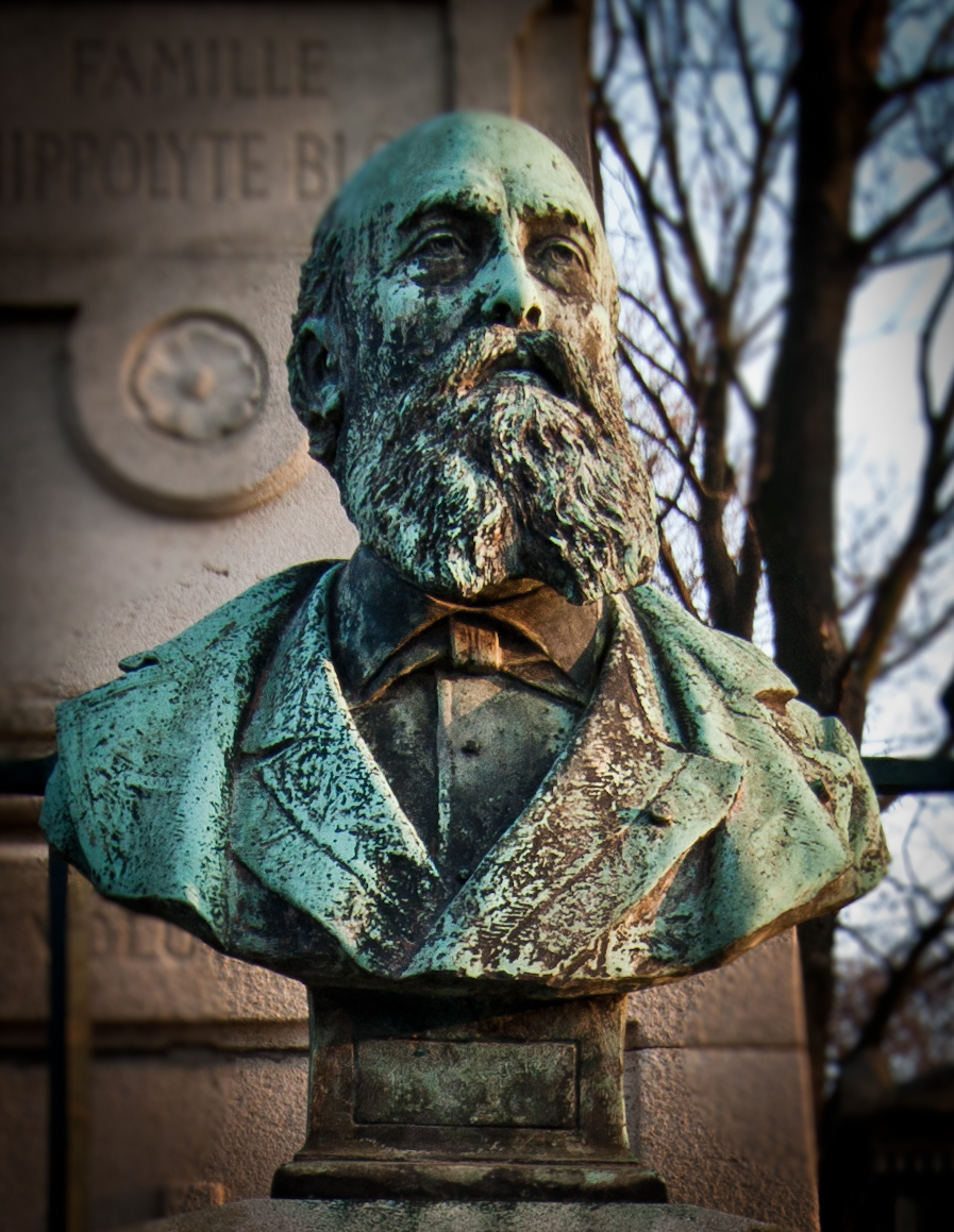 Buste d'Adolphe Deslandres - cimetière de Montmartre